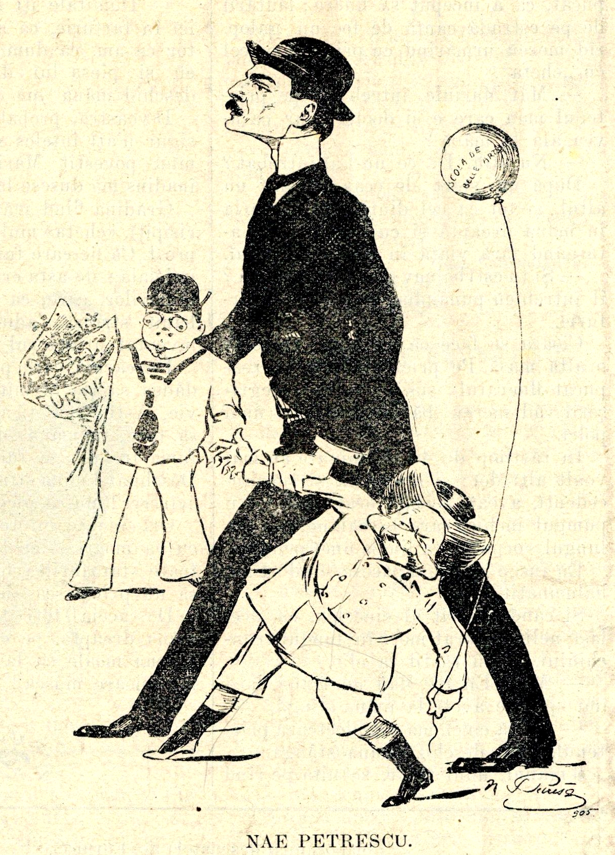 NSPetrescuGaina